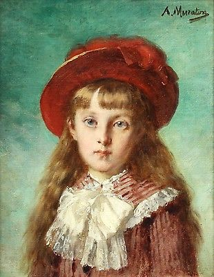 Portrait de fillette au chapeau rouge (vers 1890) par Alphonse Muraton (1824-1911), HST.